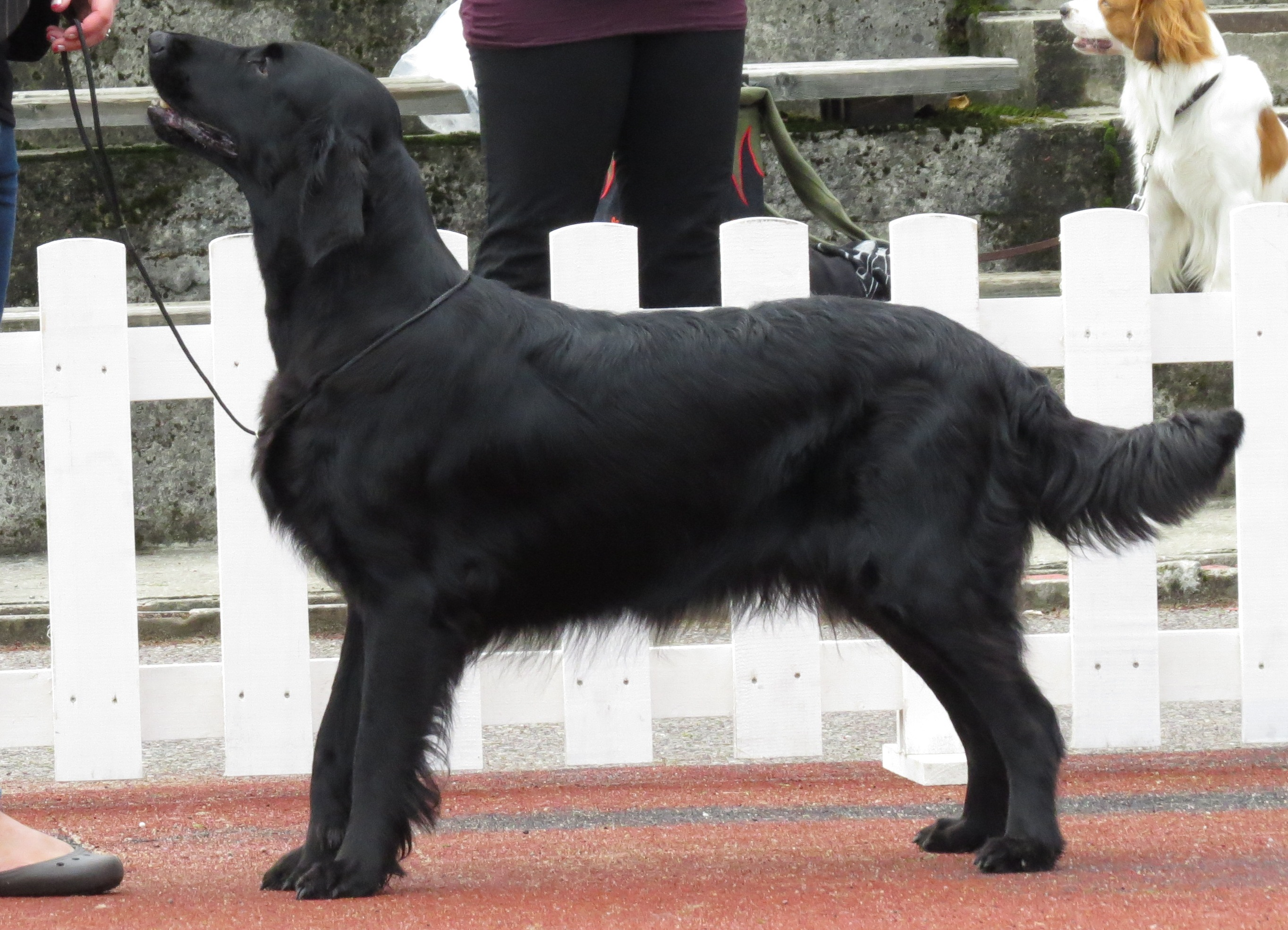 Flat-Coated Retriever